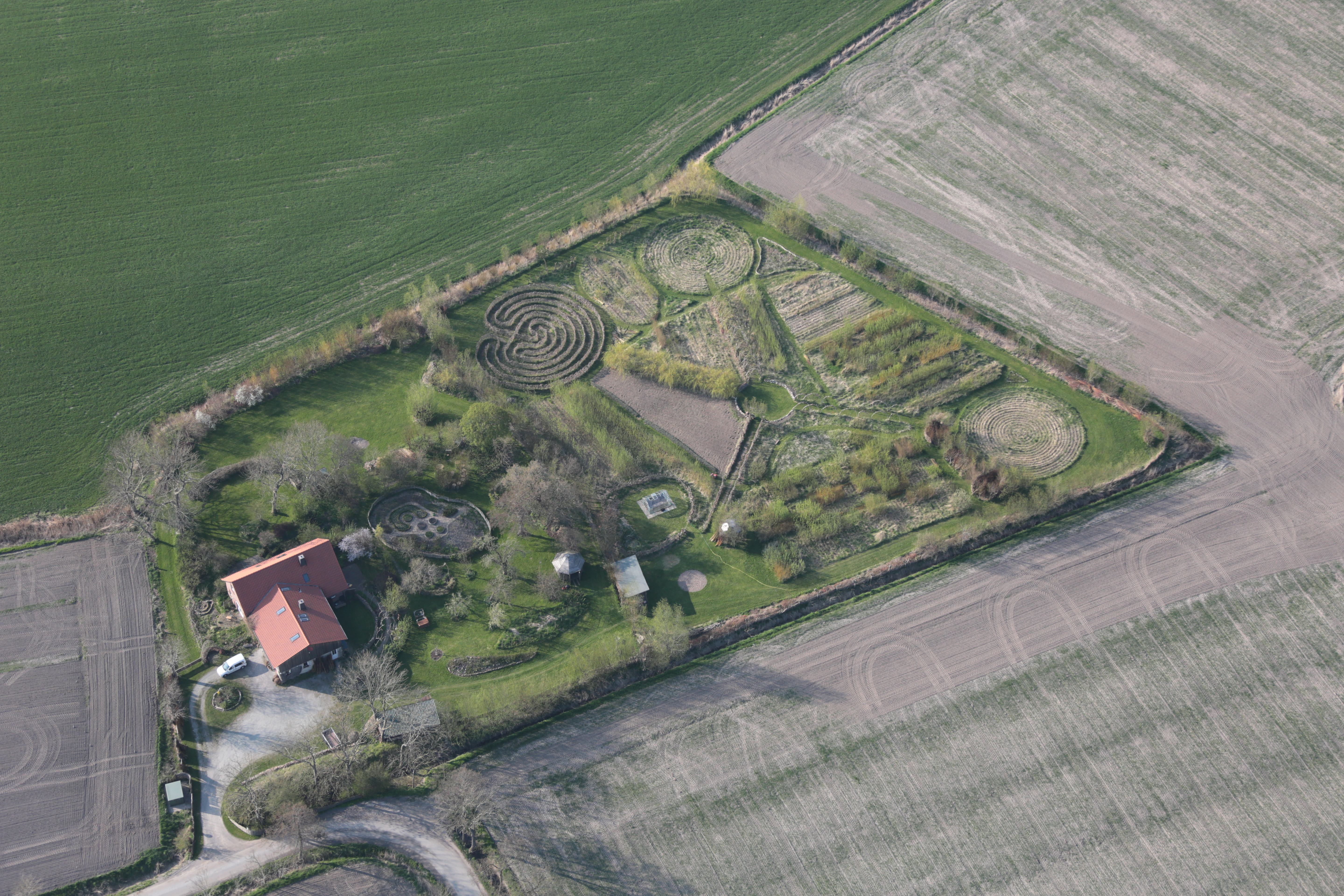 Fotoflug von Nordholz-Spieka nach Oldenburg und Papenburg: Weidenzentrum Land Wursten, Rotthausener Weg, Padingbüttel, Gemeinde Wurster Nordseeküste This photo was taken by Alchemist-hp. If you use one of my photos, an email (account needed) or a message or direct to: my email account would be greatly appreciated. Please note the license terms. Other licensing terms can get discussed, too. This file is copyrighted and has been released under a license which is incompatible with Facebook's licensing terms. It is not permitted to upload this file to Facebook.